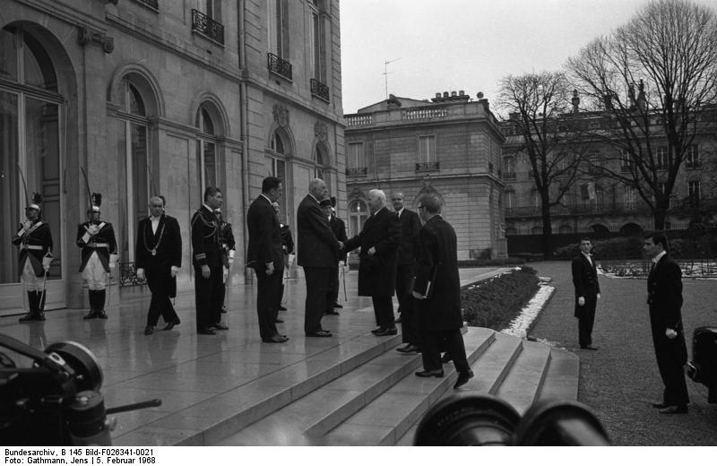 Einweihung der deutschen Botschaftsresidenz, Palais Beauharnais, in Paris: 2-17 Bundespräsidenet Lübke und Gattin besichtigen das "Jeu de Paume" in Begleitung der Botschafter-Gattin Frau Klaiber. 20-22 Frühstück im Elisée für Bundespräsident Lübke.